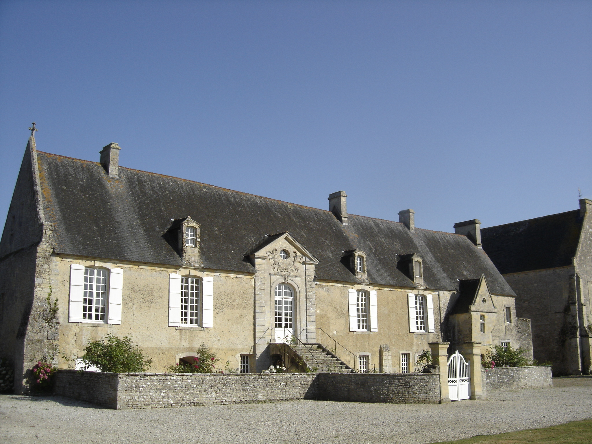 Église Saint-Pierre, (Inscrit, 1927) Logis abbatial du XVIIIè siècle de l'Abbaye Sainte Marie .